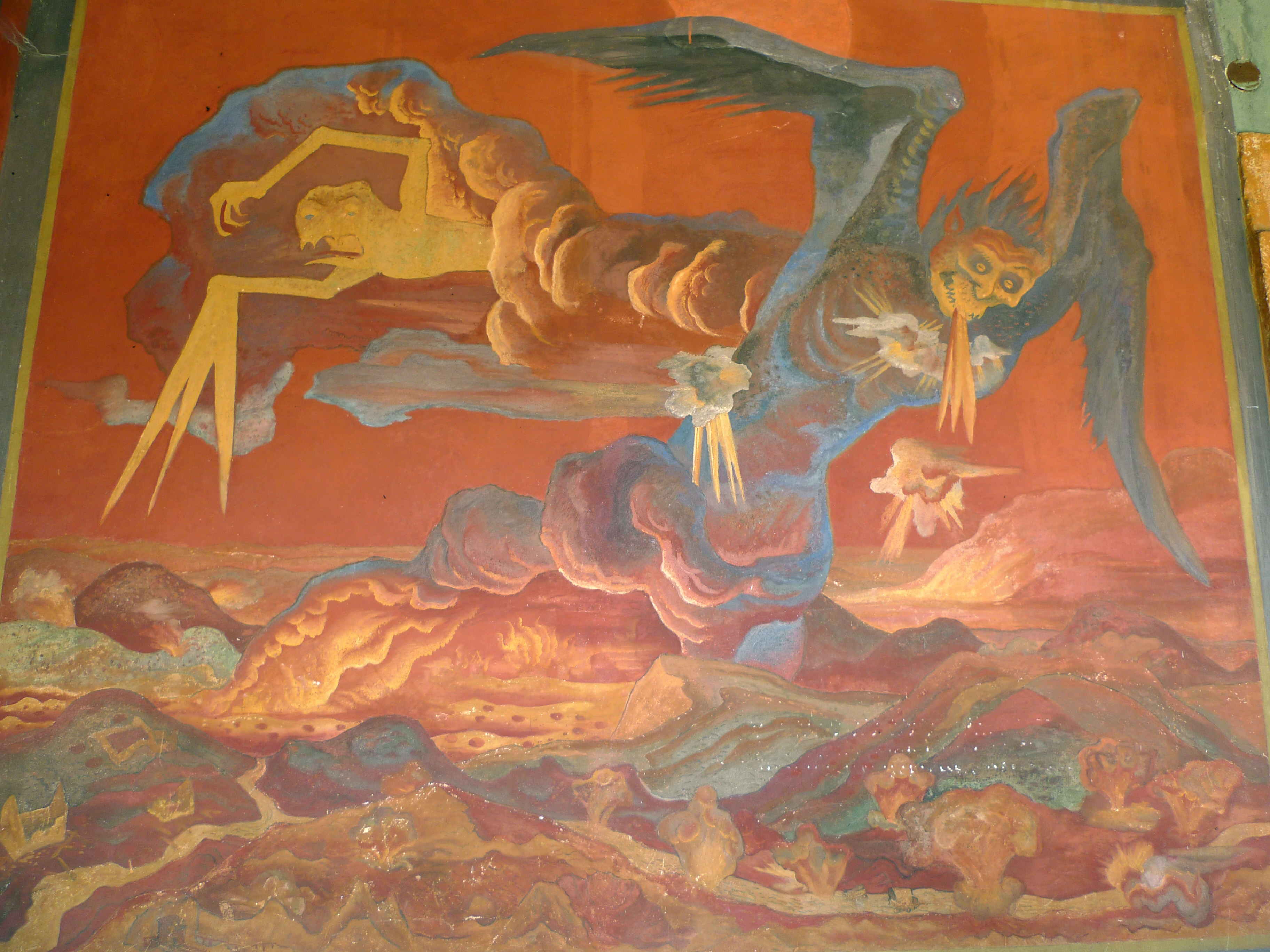 Kriegerdenkmaltitle QS:P1476,de:"Kriegerdenkmal" label QS:Lde,"Kriegerdenkmal"